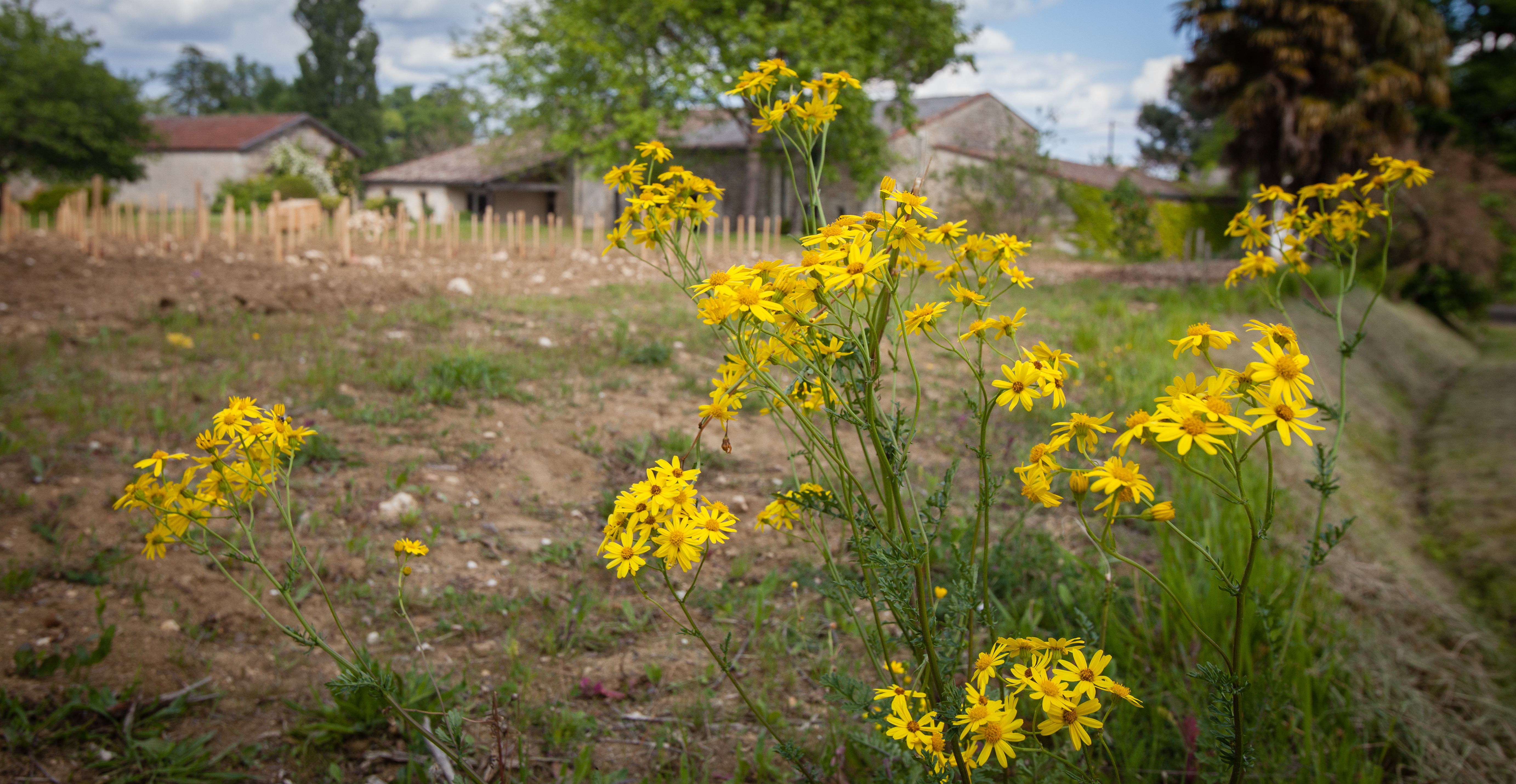 Bordeaux Bio Cotes de Francs plante jeune vignes